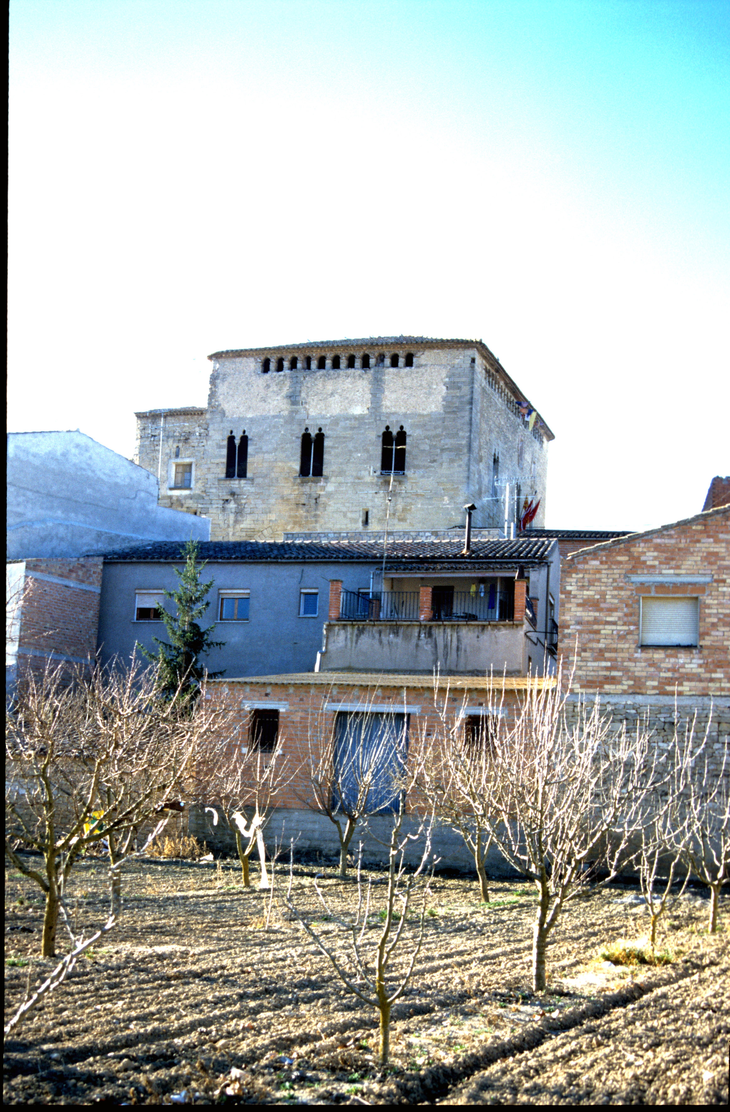 Vista general del castell de l'Espluga Calva (Les Garrigues). Fou seu de la comanda de l'Hospital de Sant Joan, fundada l'any 1405